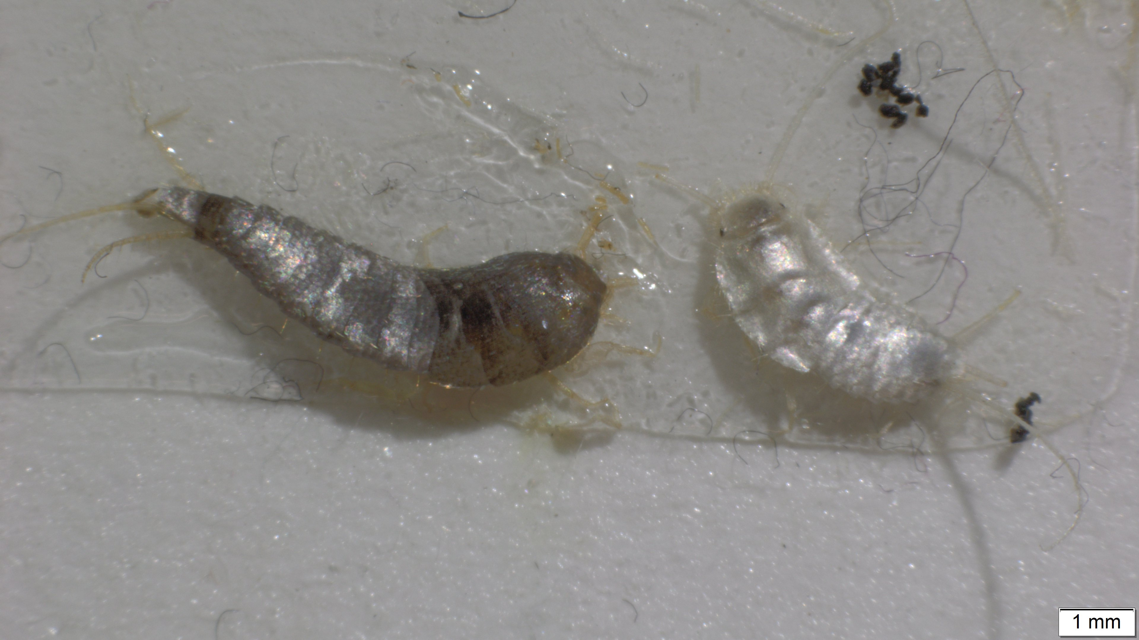 Perlekre ligner en lys sølvkre- eller skjeggkrenymfe